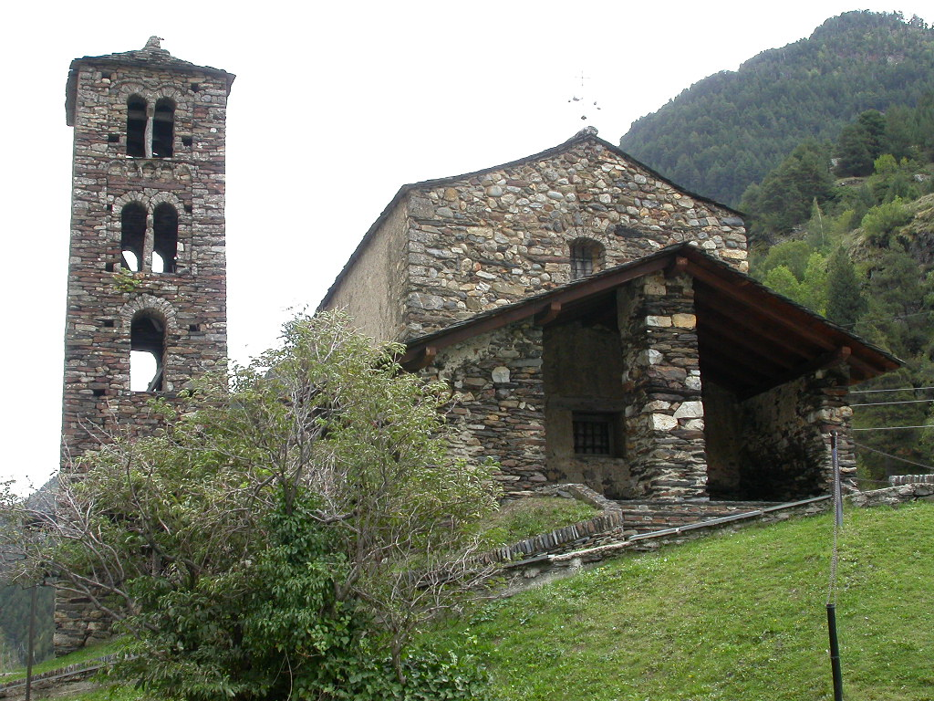 Església de Sant Joan de Caselles